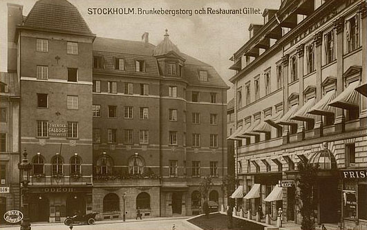 Vykort företällande Teatern Odeon vid Brunkebergstorg